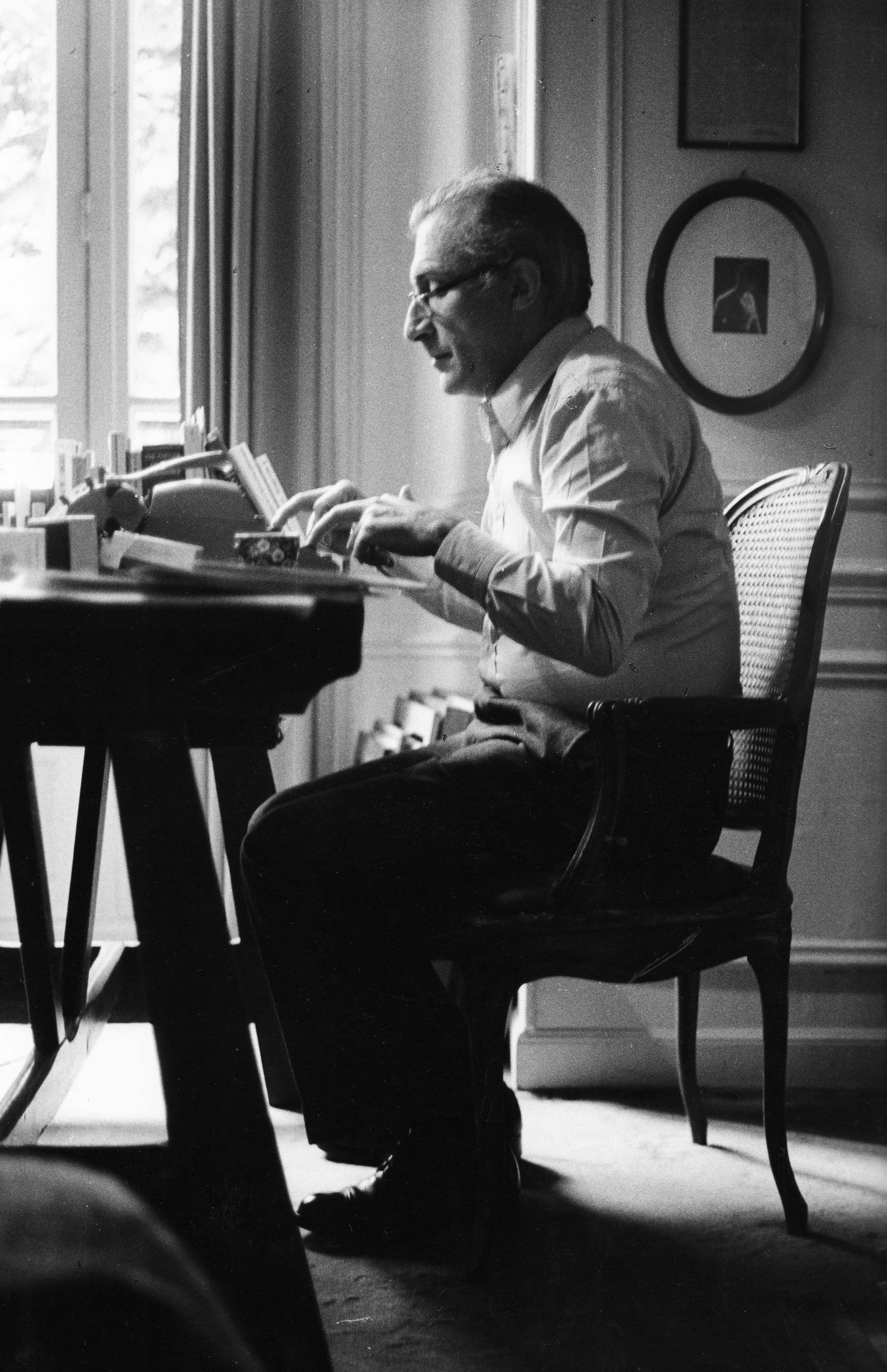 Alberto Cavallari nel suo studio in 24, Av. Charles Floquet, Parigi